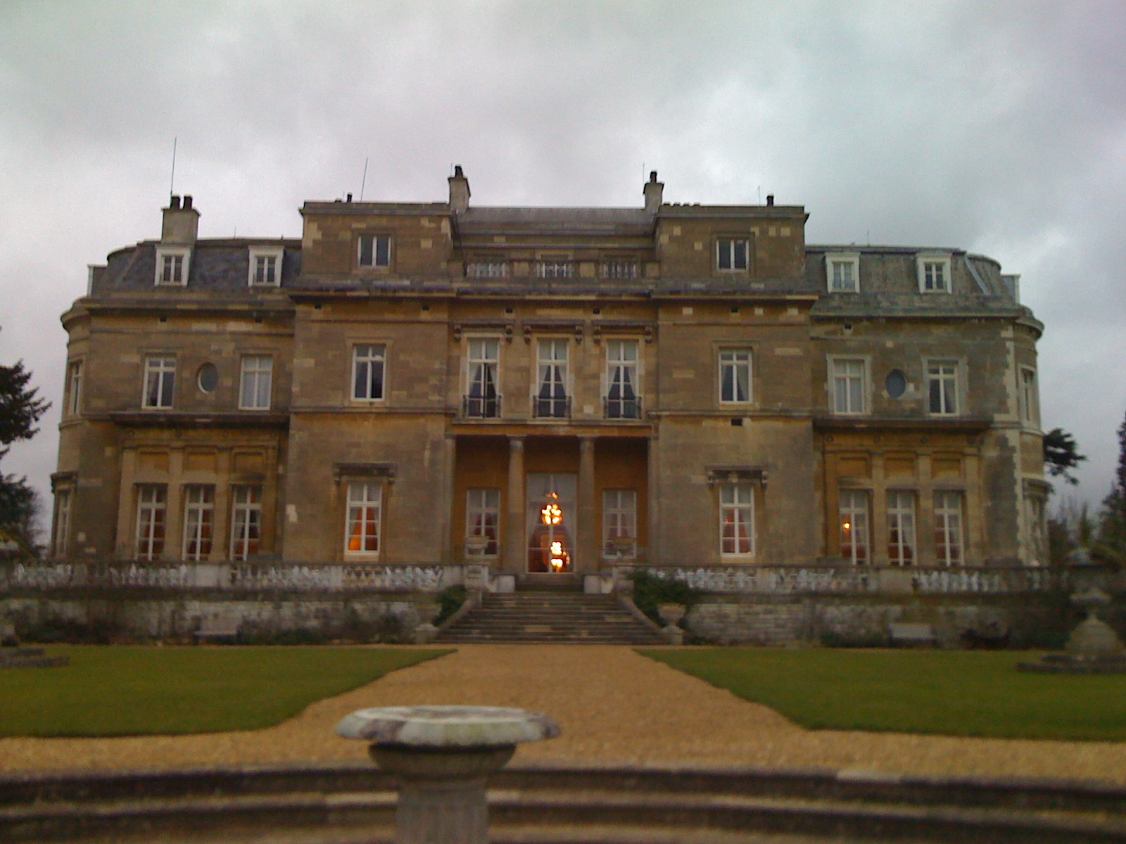 Luton Hoo